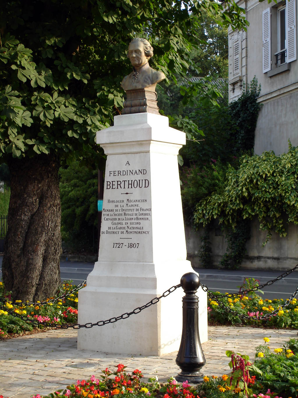 Buste de Ferdinand-Berthoud à Groslay (Val-d'Oise), France